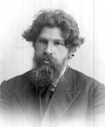 Брат - писатель-народник Сигов-Погорелов Алексей (Александр) Сергеевич (1860—1920). Павел Сергеевич Сигов (псевдоним SPS; 27 июля 1865, Пермская губерния — 1937, Екатеринбург) — учитель, акцизный чиновник, депутат II Государственной думы Российской империи от Пермской губернии (1907).